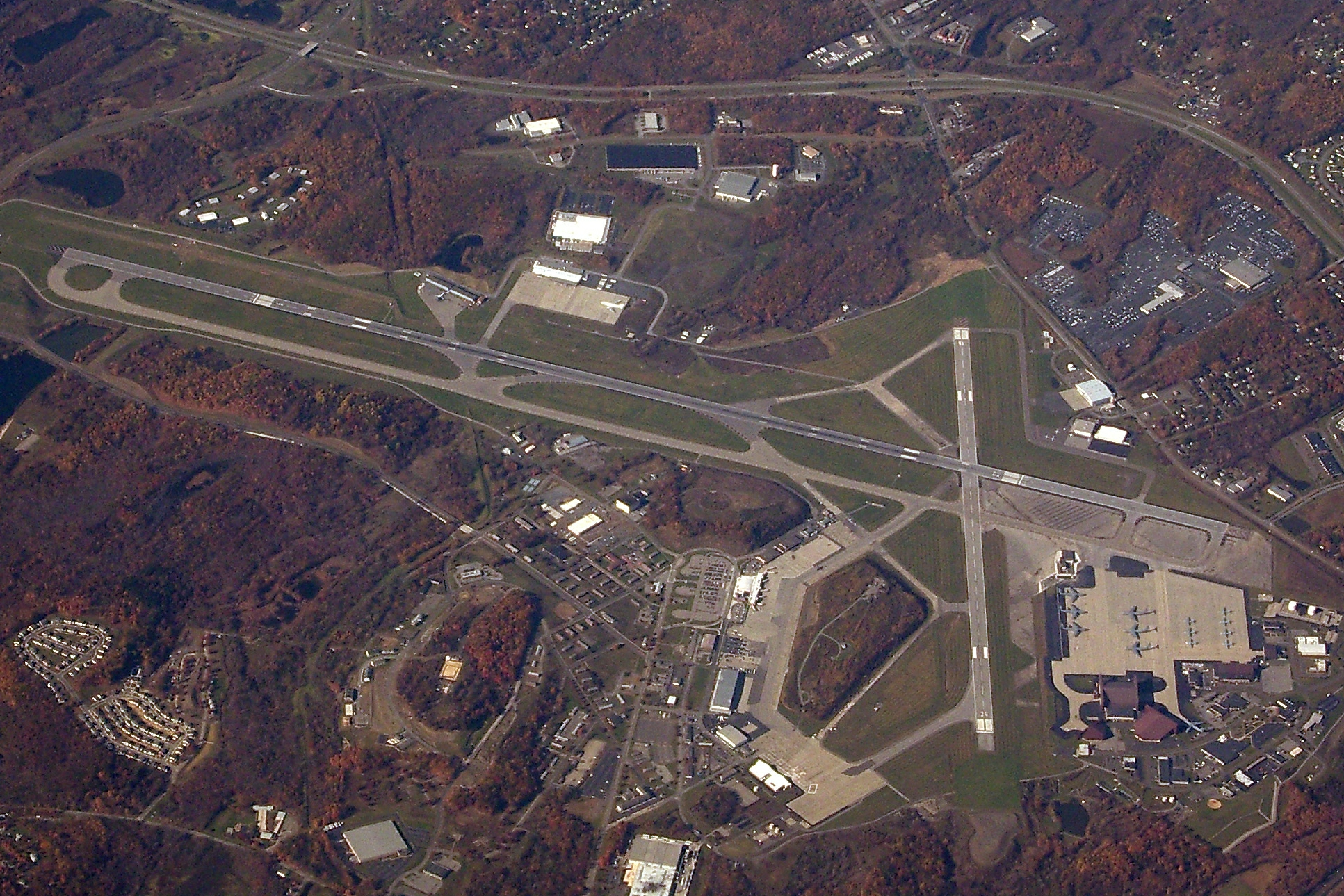 MSN 29004 B777-228 ER AIR FRANCE FLIGHT CDG-IAD SWF AIRPORT